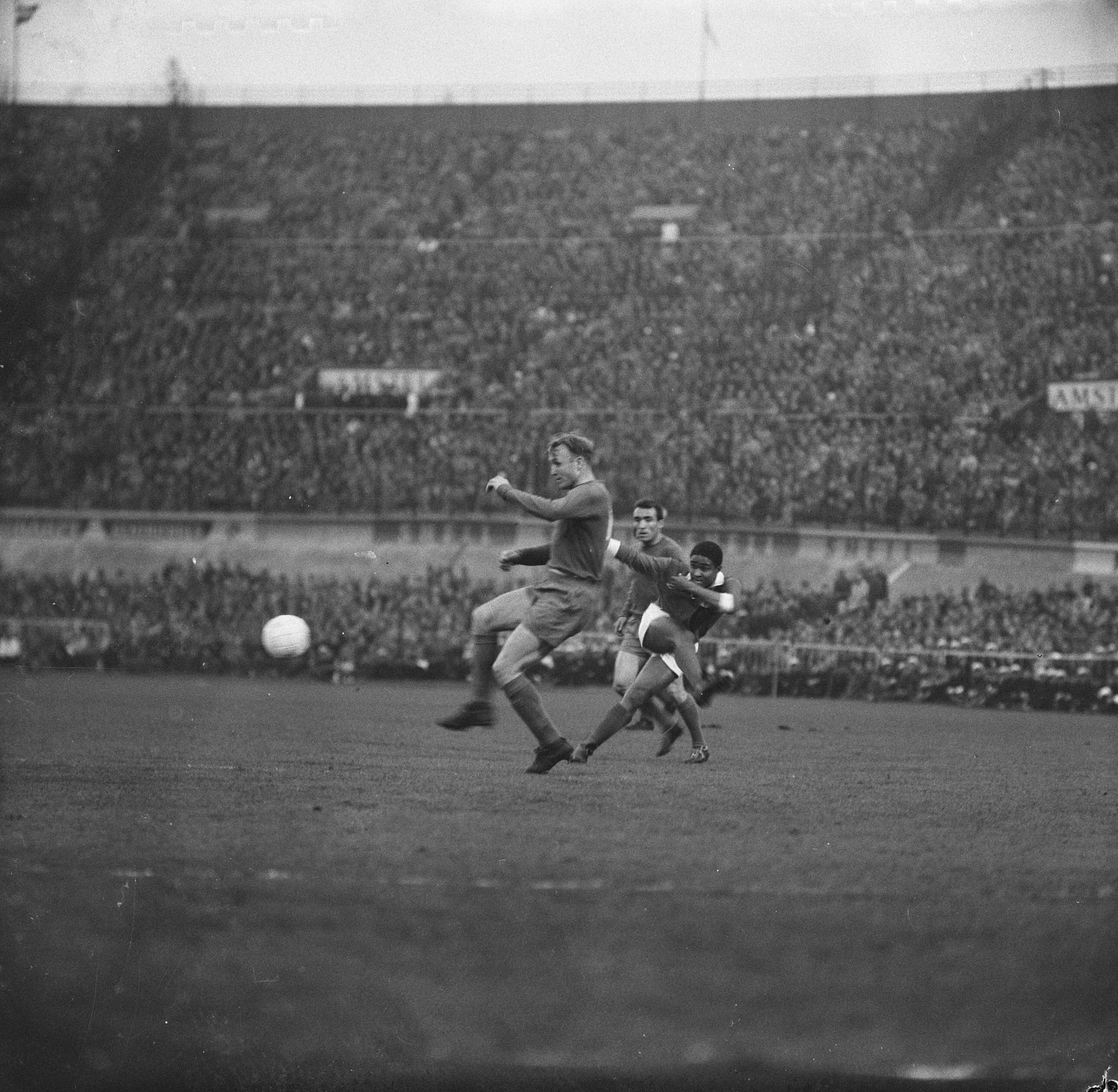 Collectie / Archief : Fotocollectie Anefo Reportage / Serie : [ onbekend ] Beschrijving : Beufica tegen Real Madrid 5-3 spelmoment Datum : 2 mei 1962 Trefwoorden : sport, voetbal Instellingsnaam : Real Madrid Fotograaf : Nijs, Jac. de / Anefo Auteursrechthebbende : Nationaal Archief Materiaalsoort : Negatief (zwart/wit) Nummer archiefinventaris : bekijk toegang 2.24.01.03 Bestanddeelnummer : 913-8524